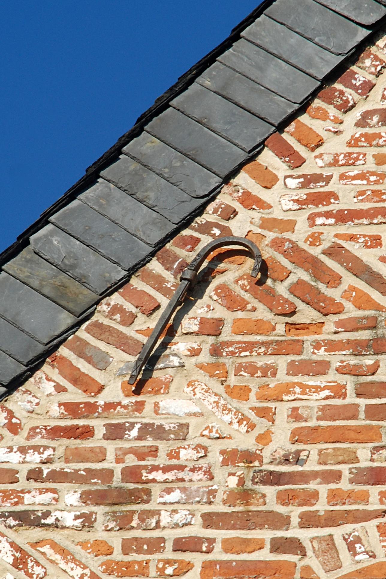 Belgique - Wallonie - Ottignies - Ferme du Douaire